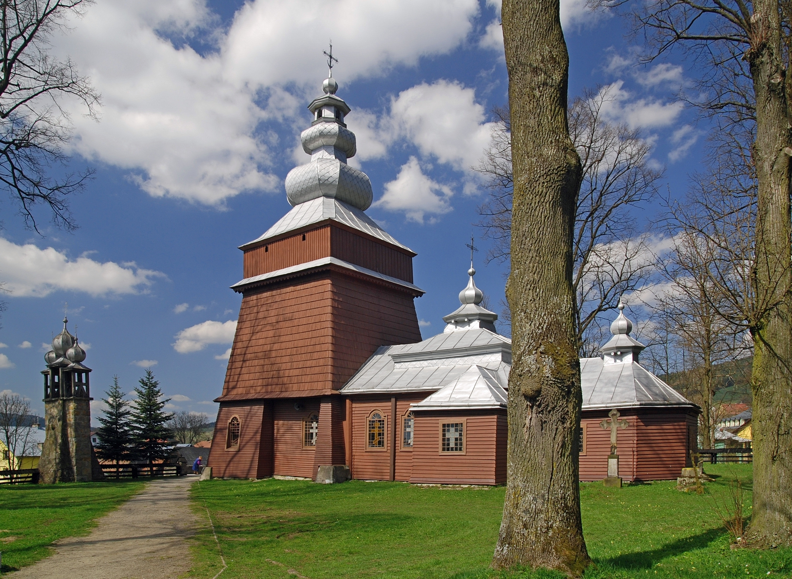 wieś Tylicz